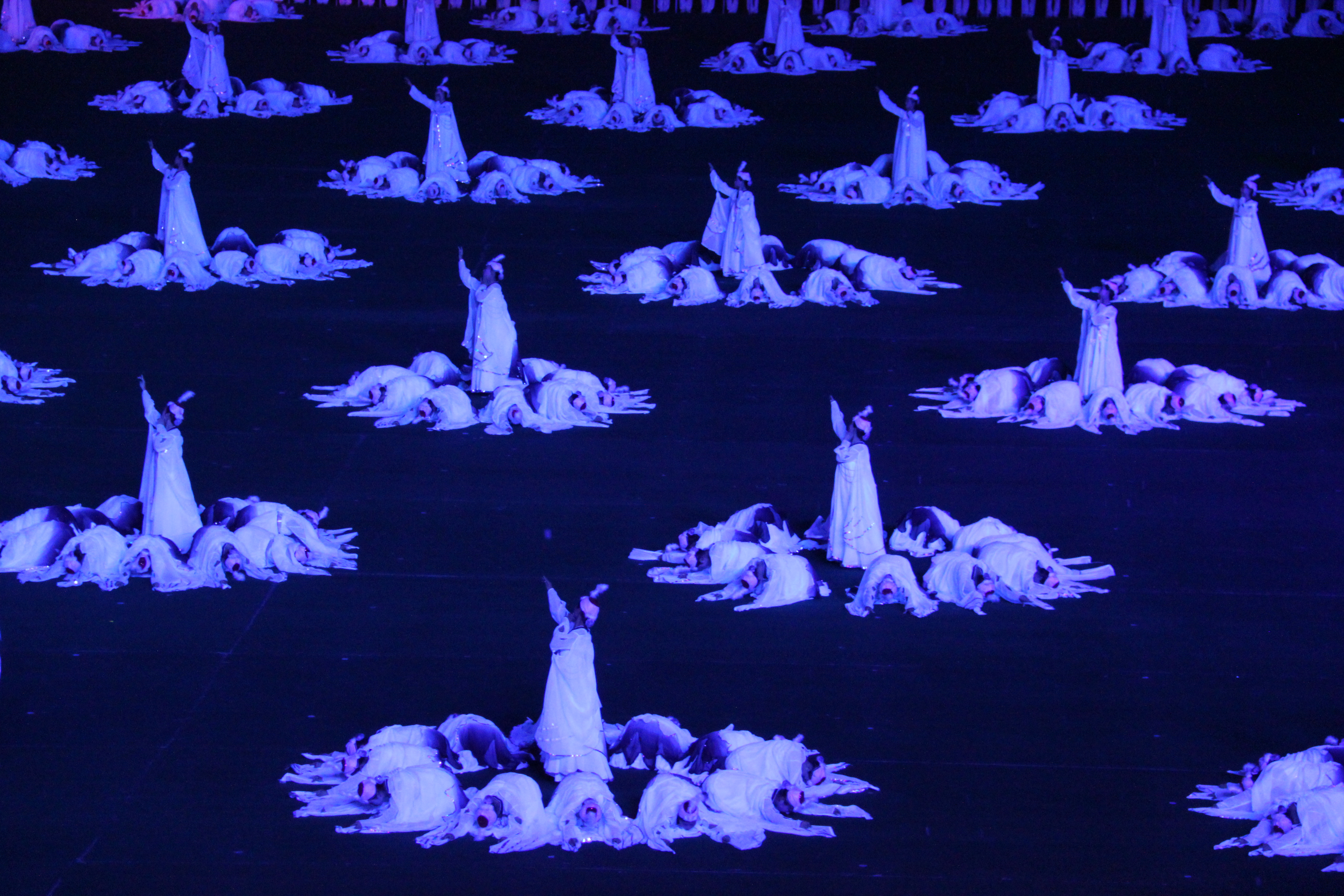 Arirang Mass Games